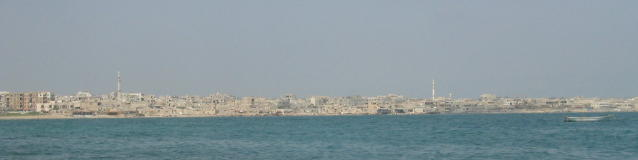 Private image. bosaso view